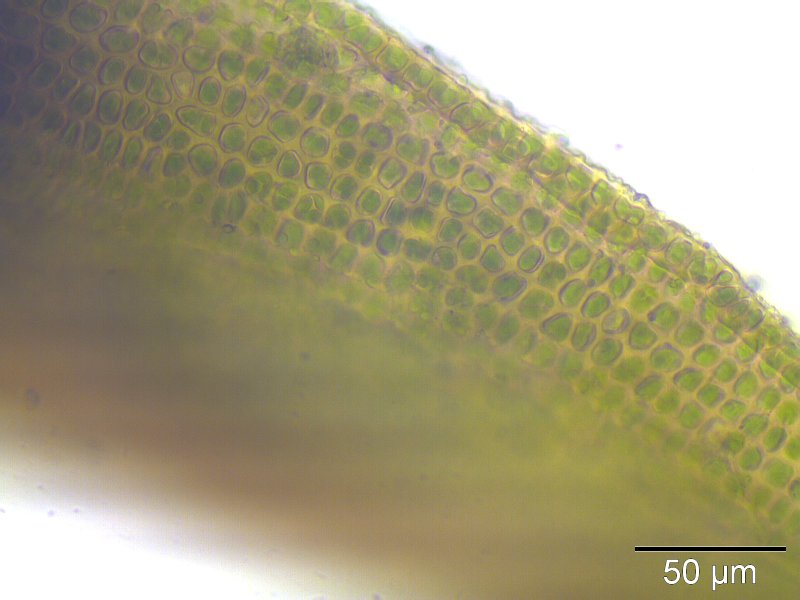 (Dichodontium pellucidum), Laminazellen, etwa 400x vergrößert